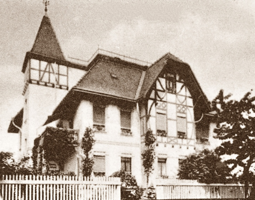 Villa Alte Ziegelei zu Lobstädt (Gemeinde Neukieritzsch) auf einer Postkarte von 1906, Straßenansicht